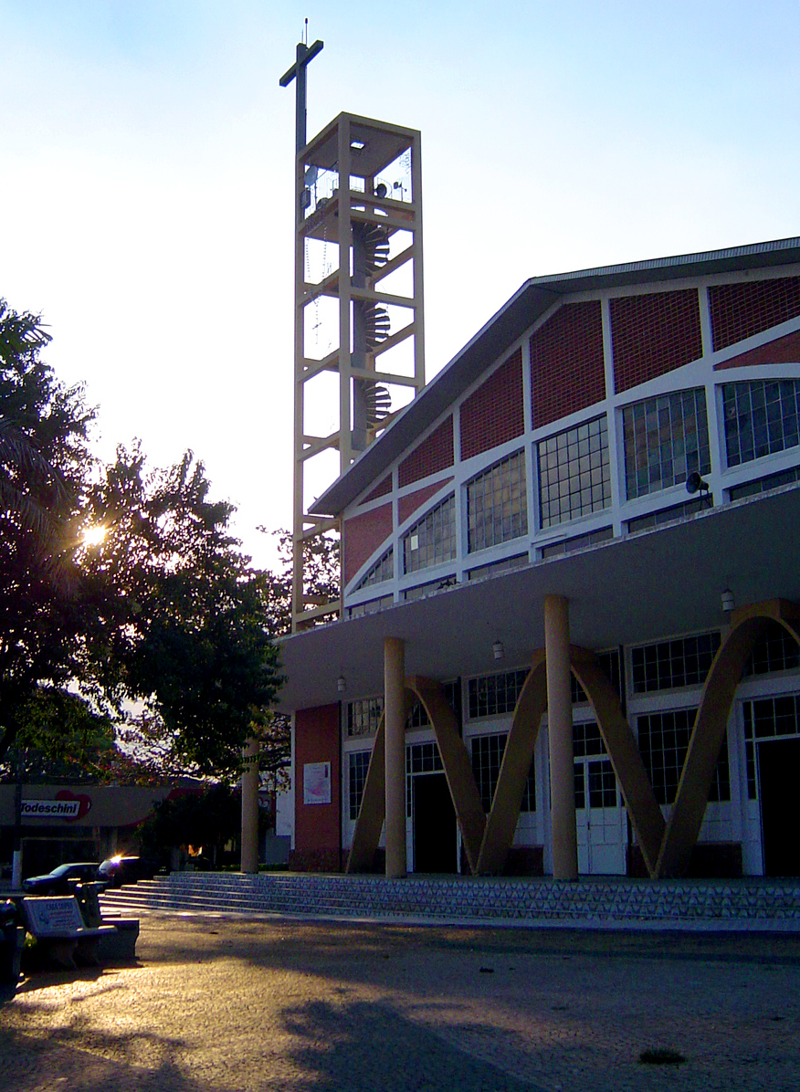 Paróquia Nossa Senhora do Rosário - Mogi Guaçu, Brasil